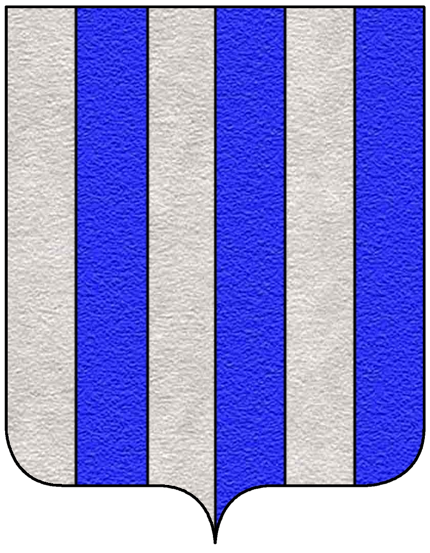 Stemma della famiglia Avogadro